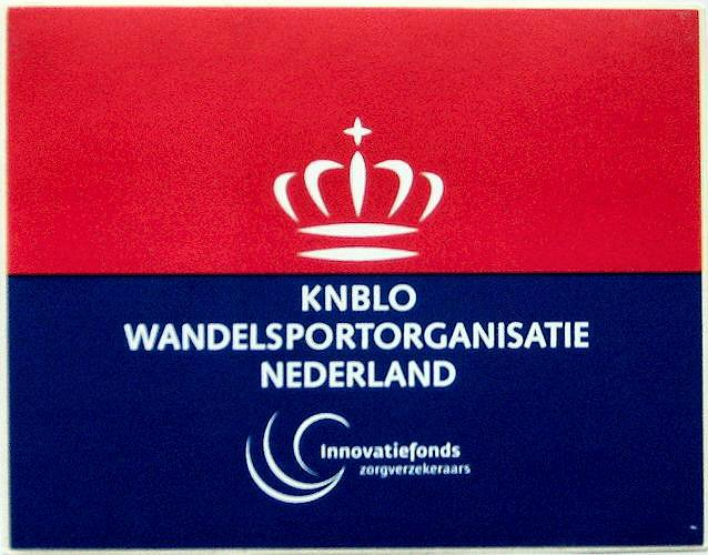 Routemarkering KNBLO Jubileum wandelpad (sticker)